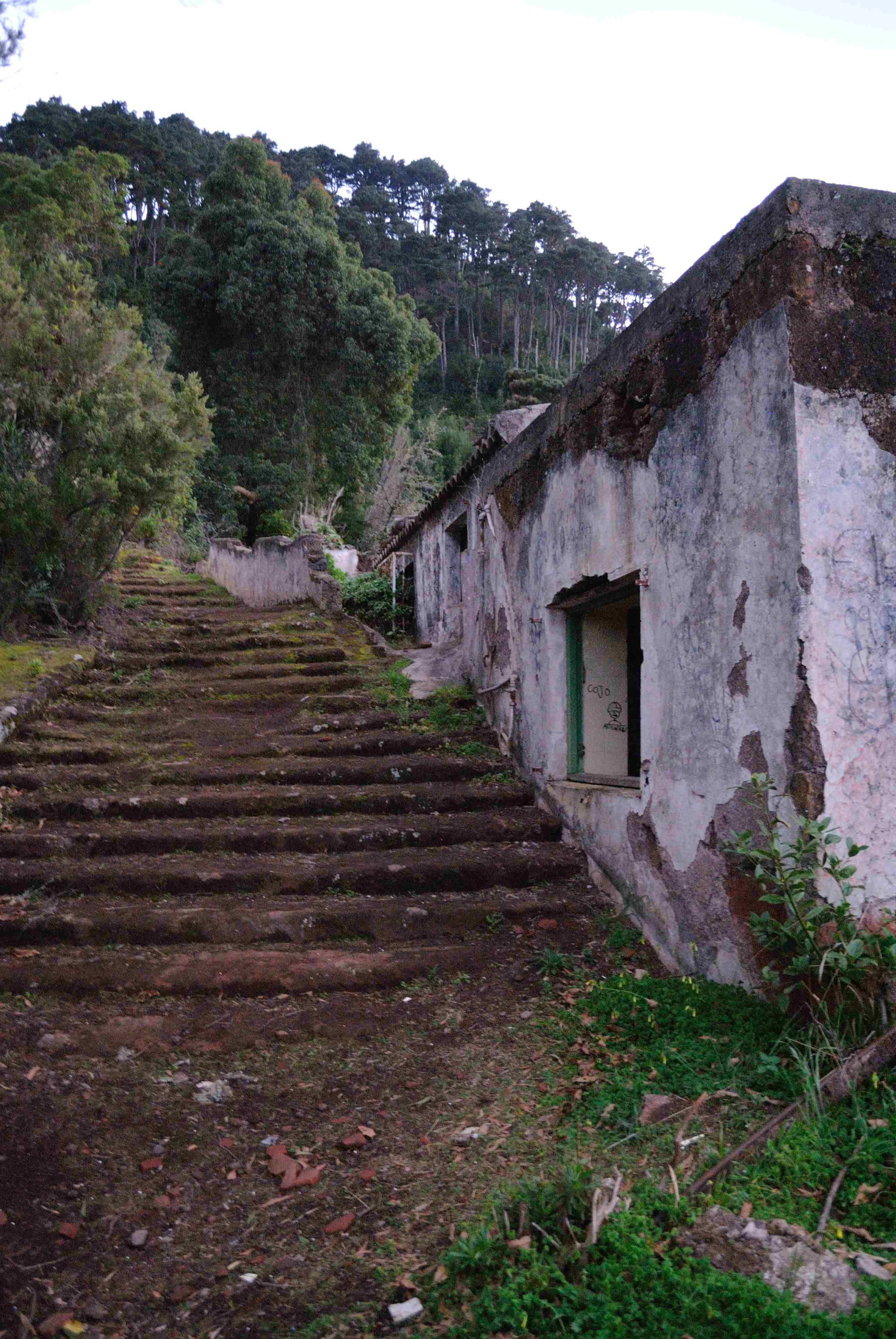 Antigua casa abandonada en medio del monte de Anaga